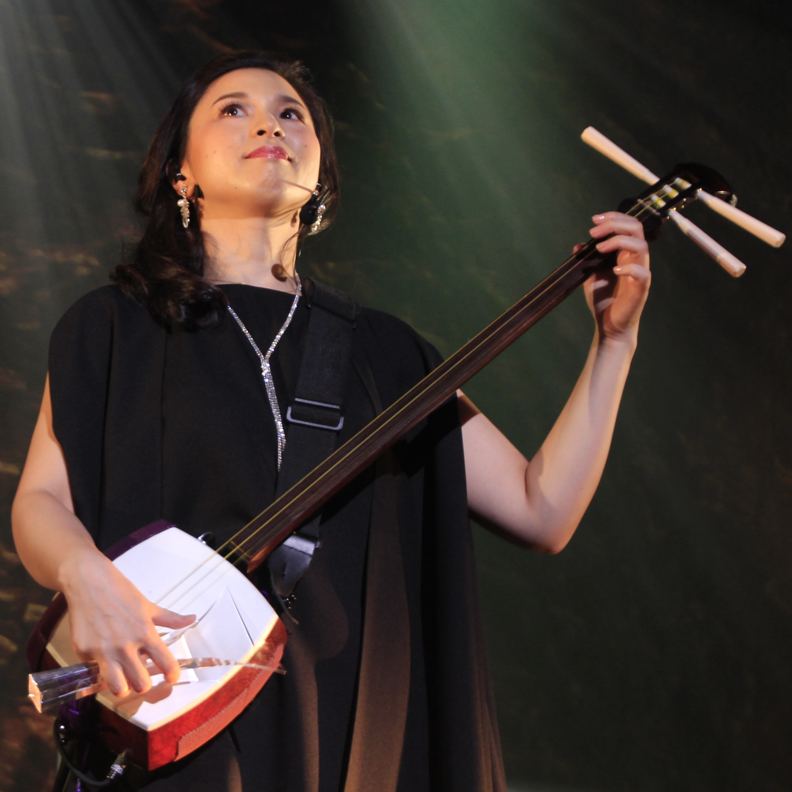 新井智恵